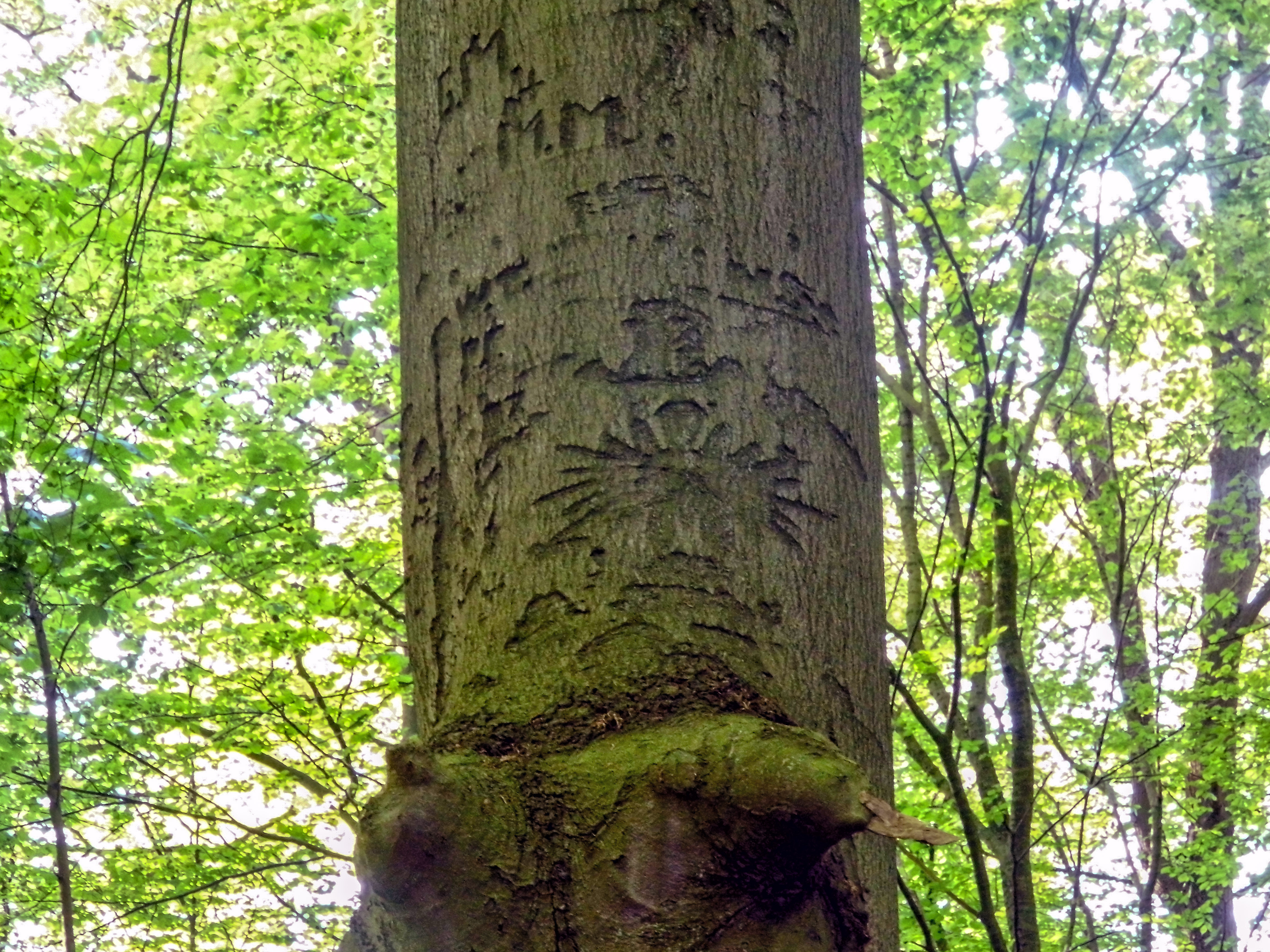 An dieser 150 bis 200 Jahre alten Buche ist in ca. 6 Metern höhe ein Reichsadler eingeritzt. Es wird vermutet, dass dies 1918 während des Kieler Matrosenaufstandes geschah.